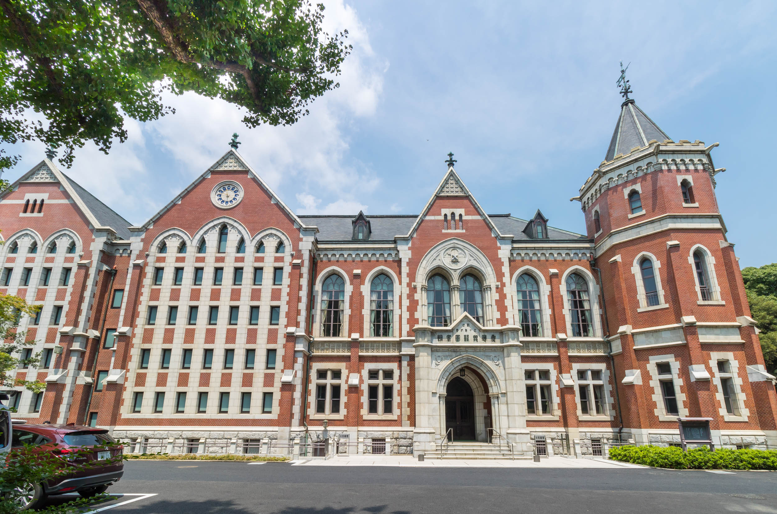 慶應義塾大学旧図書館(重要文化財)、東京都港区、曽禰達蔵設計、1912年。